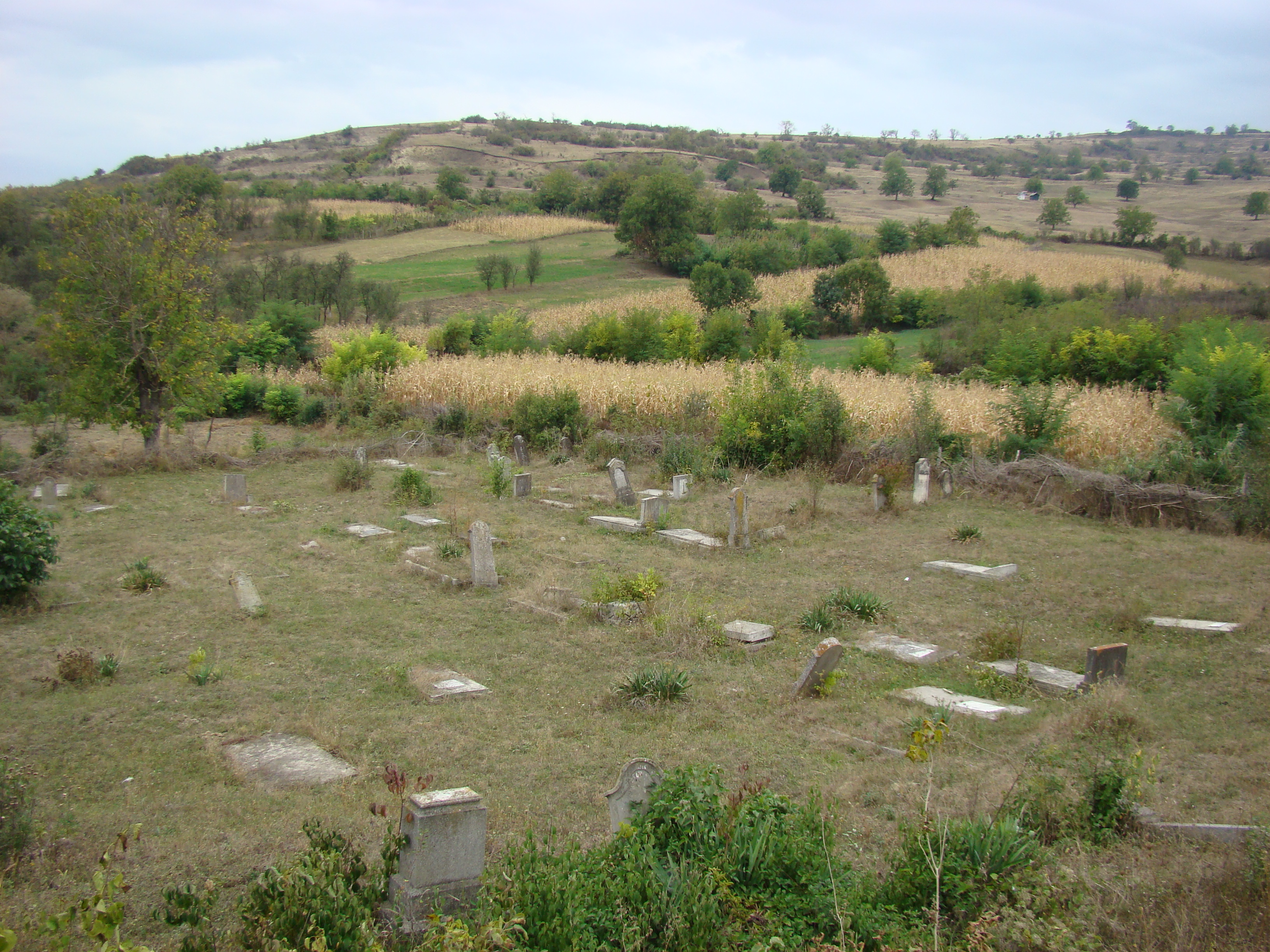 Ansamblul bisericii evanghelice, sat Veseuș; comuna Jidvei, județul Alba (cimitirul evanghelic)